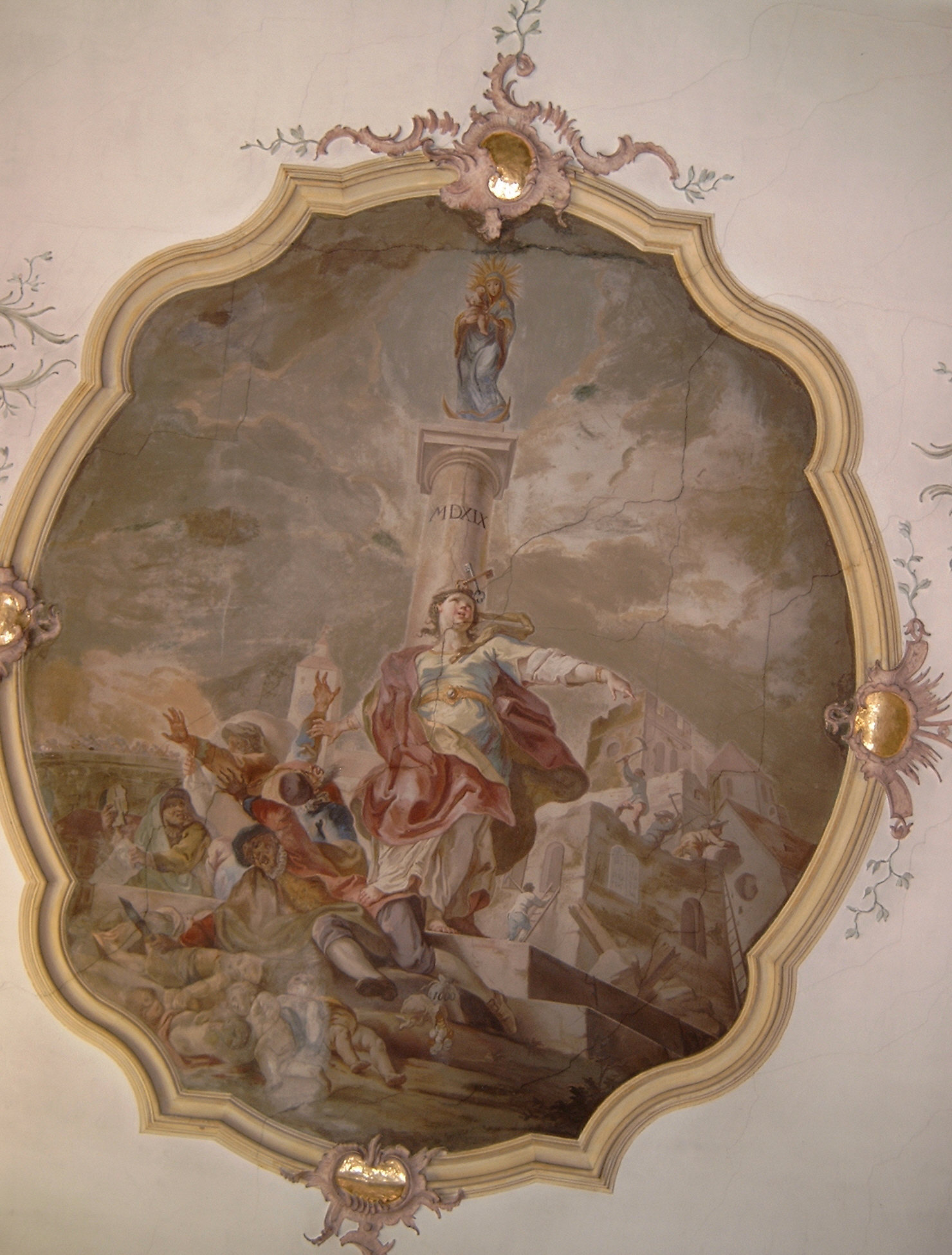 Deckenfresko in der Kassianskirche (Regensburg) von Gottfried Bernhard Göz - fertiggestellt 1758. Dargestellt wird die Legende der Wallfahrt "Zur Schönen Maria", die Vertreibung der Regensburger Juden (1519), die Zerstörung der Synagoge und die stereotype Ritualmordbeschuldigung als Vertreibungsgrund.